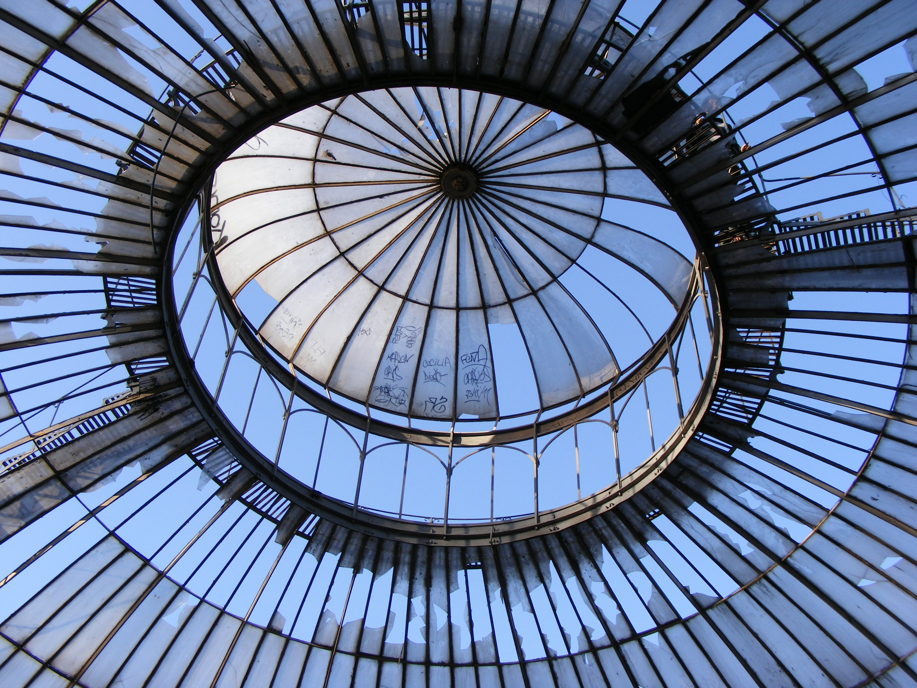 Invernadero de la Quinta Normal: Imagino que en sus buenos tiempos, debió ser un lugar maravilloso, lleno de aromas y de colores This is a photo of a national monument in Chile: 2119